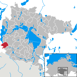 Stuer im Landkreis Müritz, Mecklenburg-Vorpommern